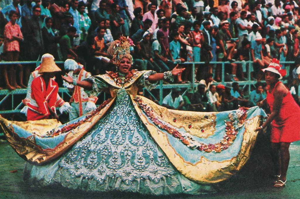 Acadêmicos do Salgueiro, 1968